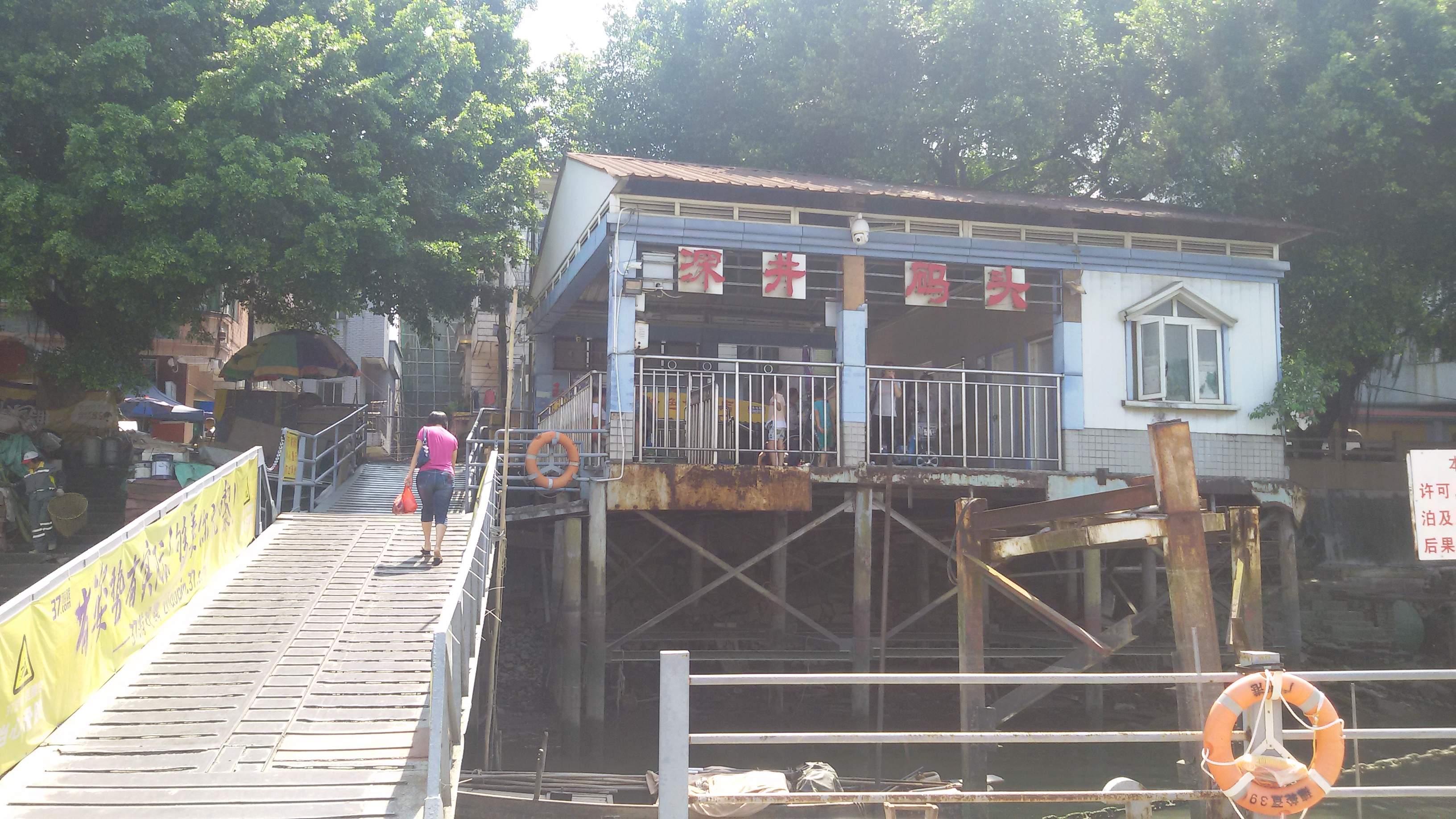 粵語: 深井码头（长洲岛）